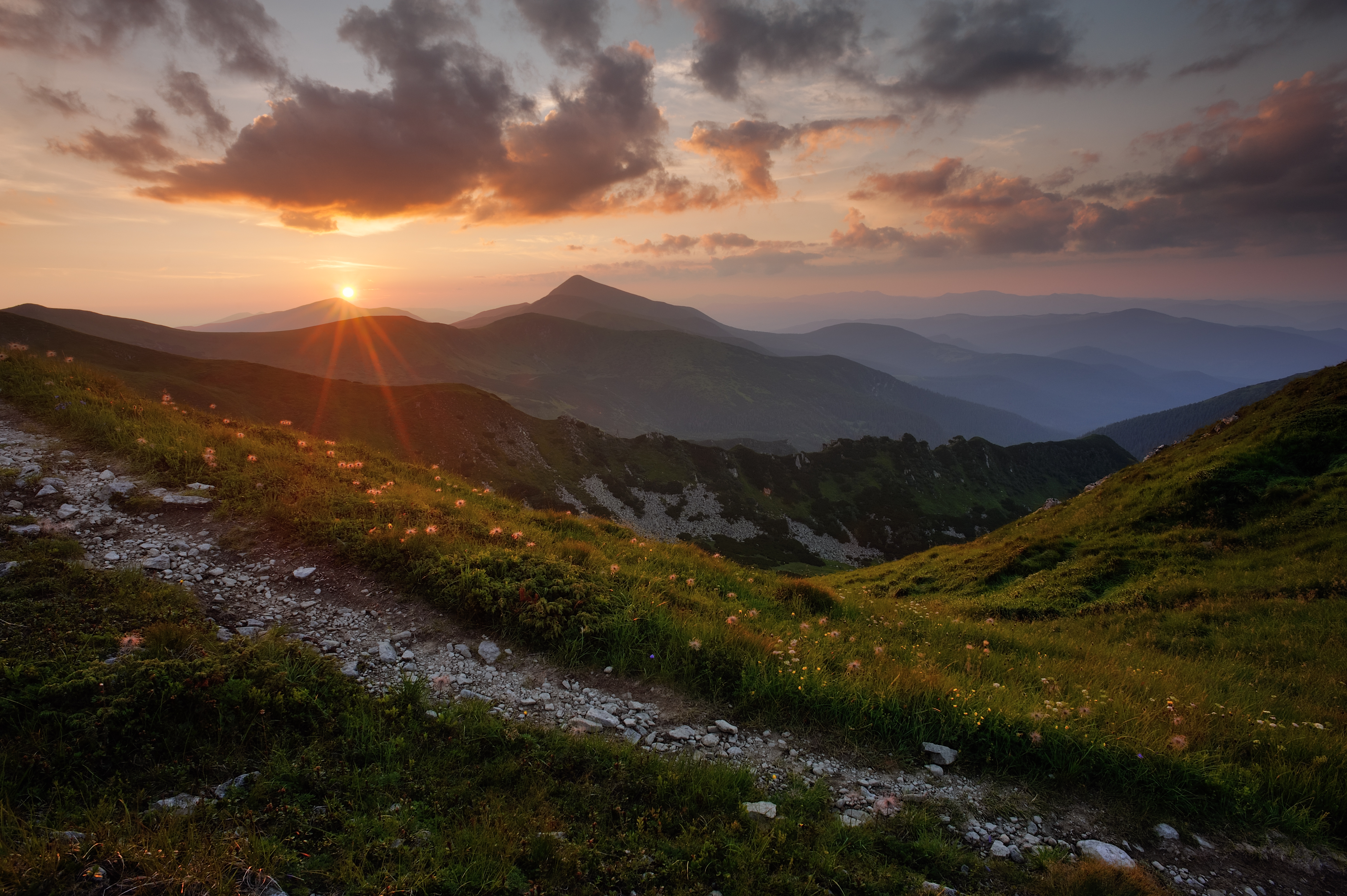 Карпатський, Яремчанська міська рада, Верховинський район, Надвірнянський район